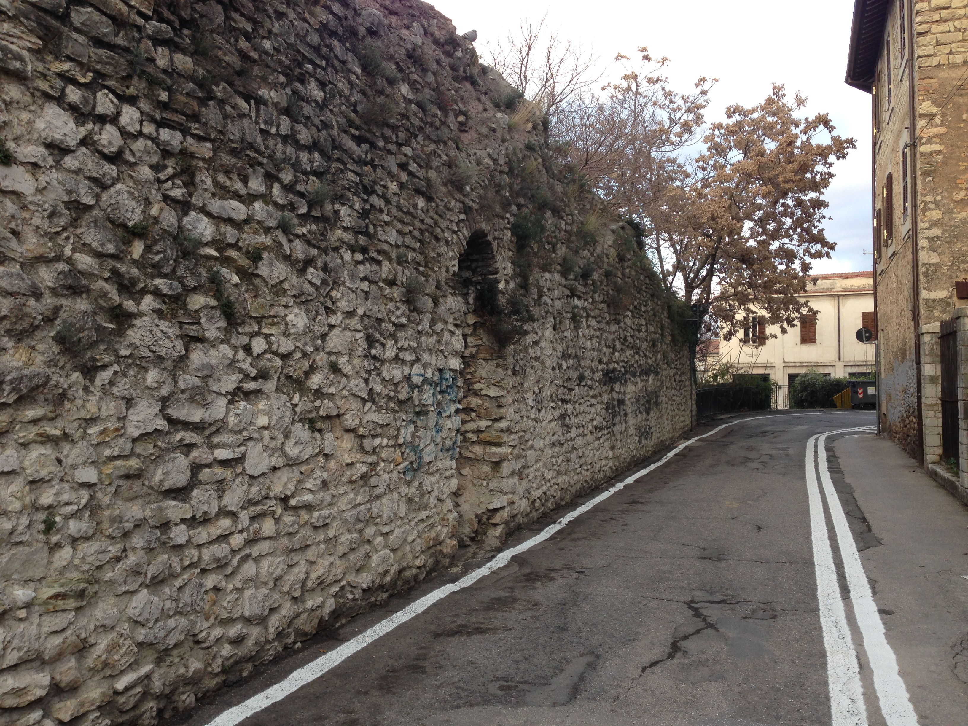 Mura urbiche trecentesche Spoleto